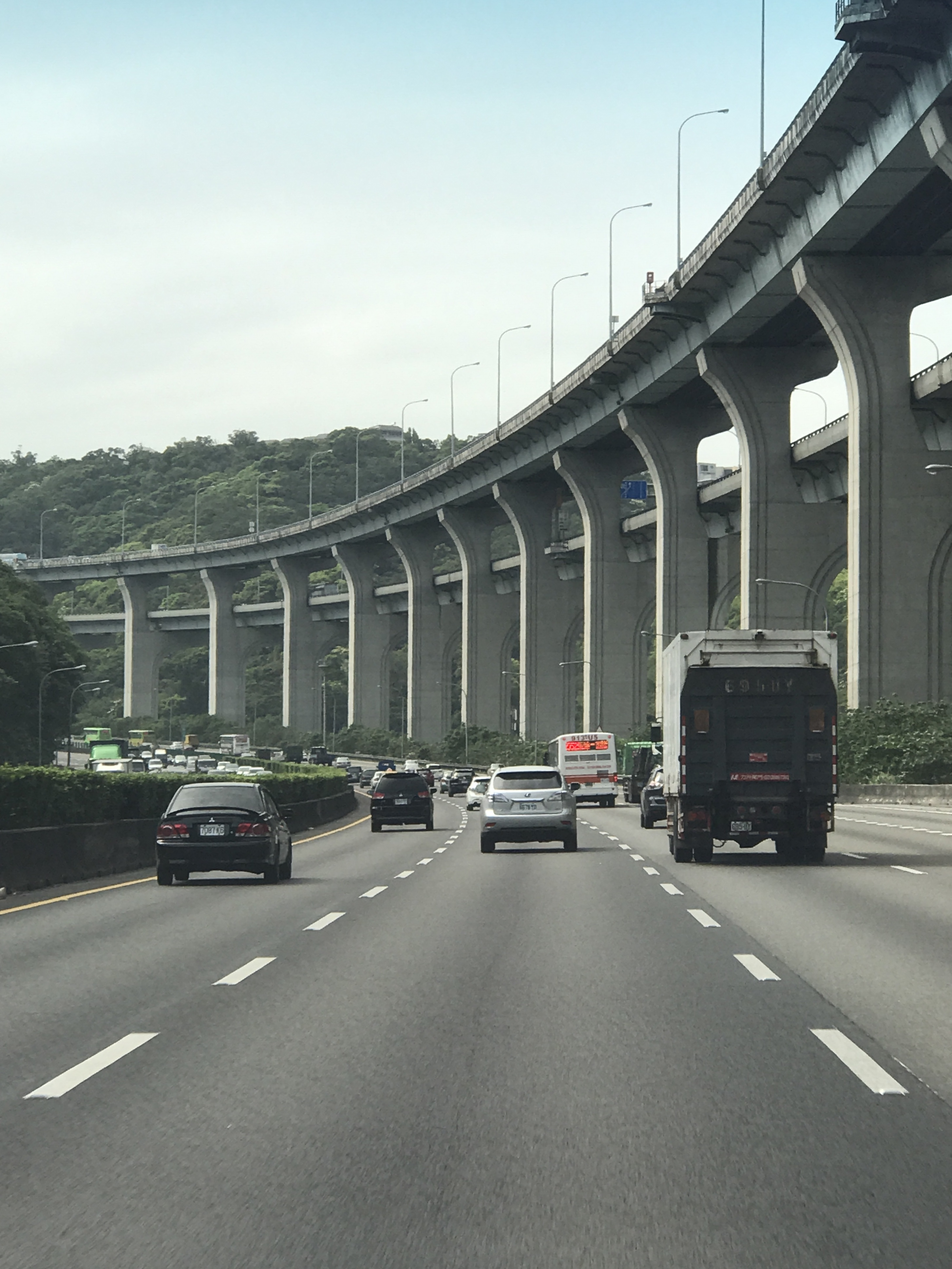 新北市泰山區的中山高速公路南下車道與五股楊梅高架道路。